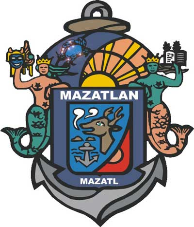 El “todo” del campo del escudo se construye con el cuarto cuartel del Escudo Oficial del Estado de Sinaloa y que corresponde a la ciudad de Mazatlán: dicho cuartel está basado en la etimología de la palabra que da su nombre al lugar de Mazatlán, que en la lengua náhuatl significa lugar de venados; aparece en el mismo una cabeza de venado de perfil, inspirado en un dibujo indígena; las formas que salen de los belfos del animal aluden al bramido del mismo, el ojo, de verde bruñido, se apoya en la leyenda que sobre el lugar de venados afirma que había una hermosa corza parda que tenía los ojos verdes y se conocen con el nombre de Dos Hermanas, el ancla hace referencia al puerto y un homenaje a los marinos que lo descubrieron y le pusieron por nombre San Juan Bautista de Mazatlán, en el siglo XVI.